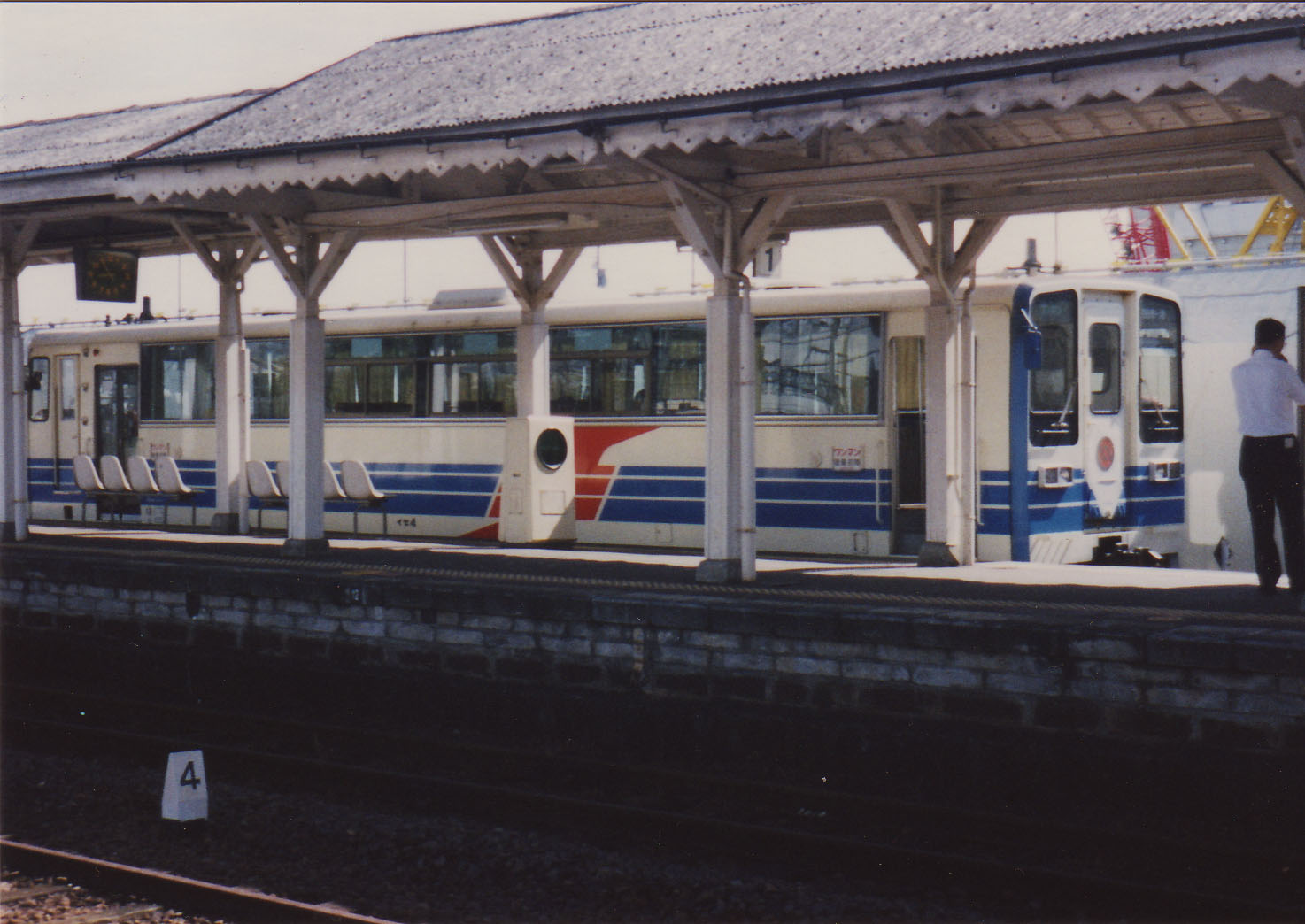 津駅にて発車を待っていたイセII形。